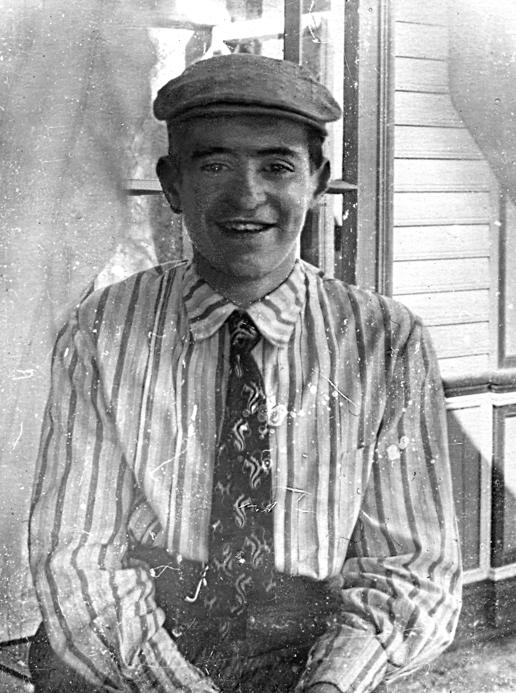 советский международник А. Я. Канторович в юности